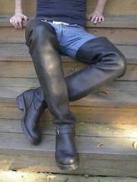 Boots